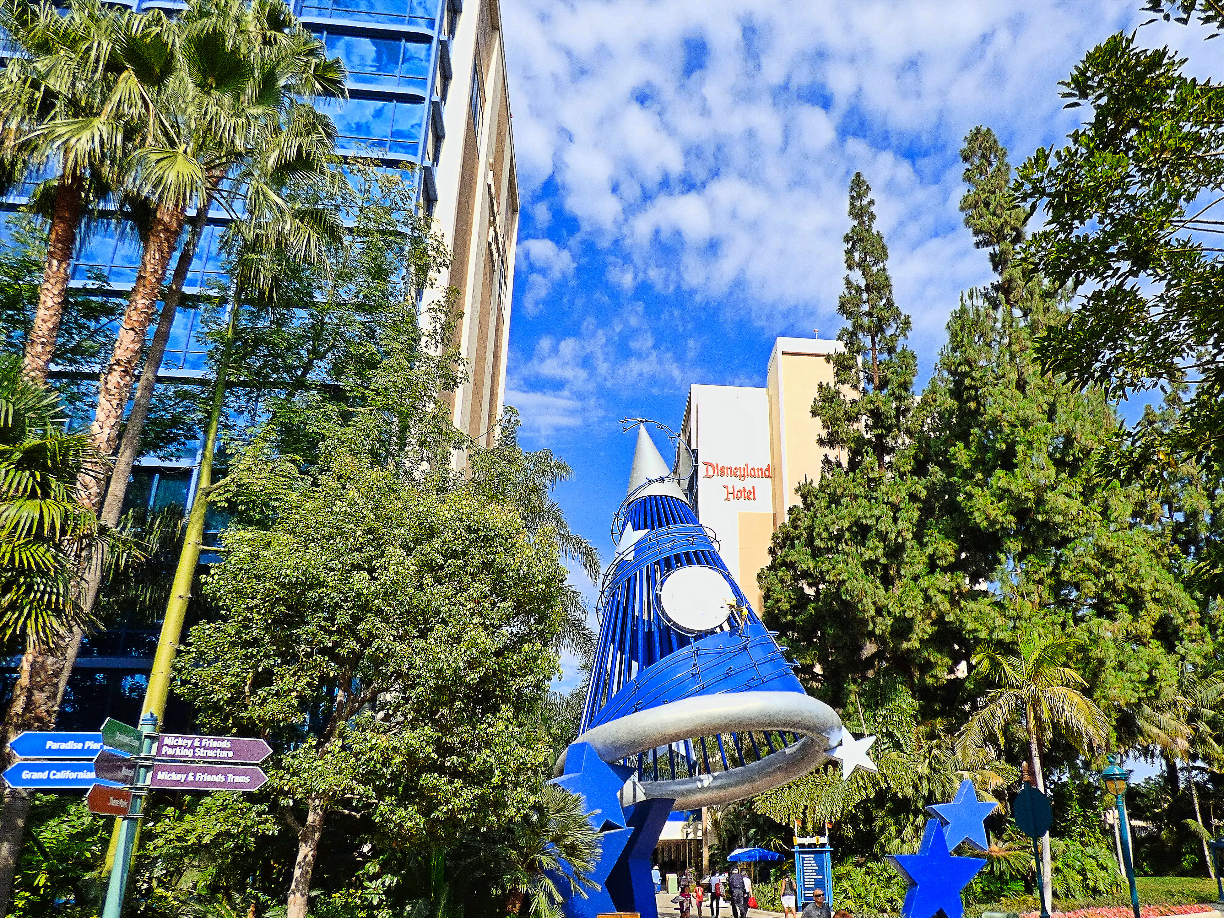 DisneylandHotel29